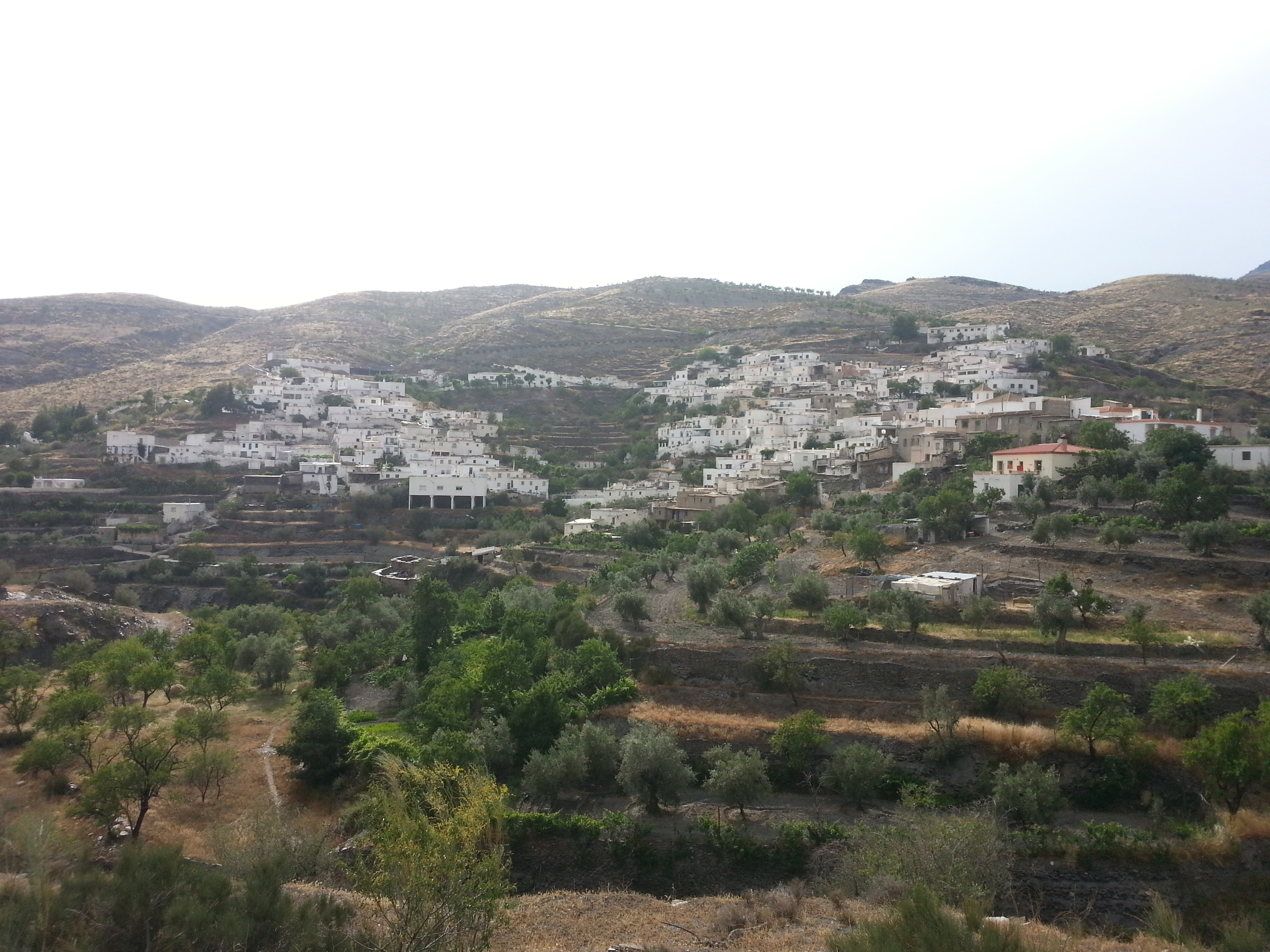 Vista general del pueblo